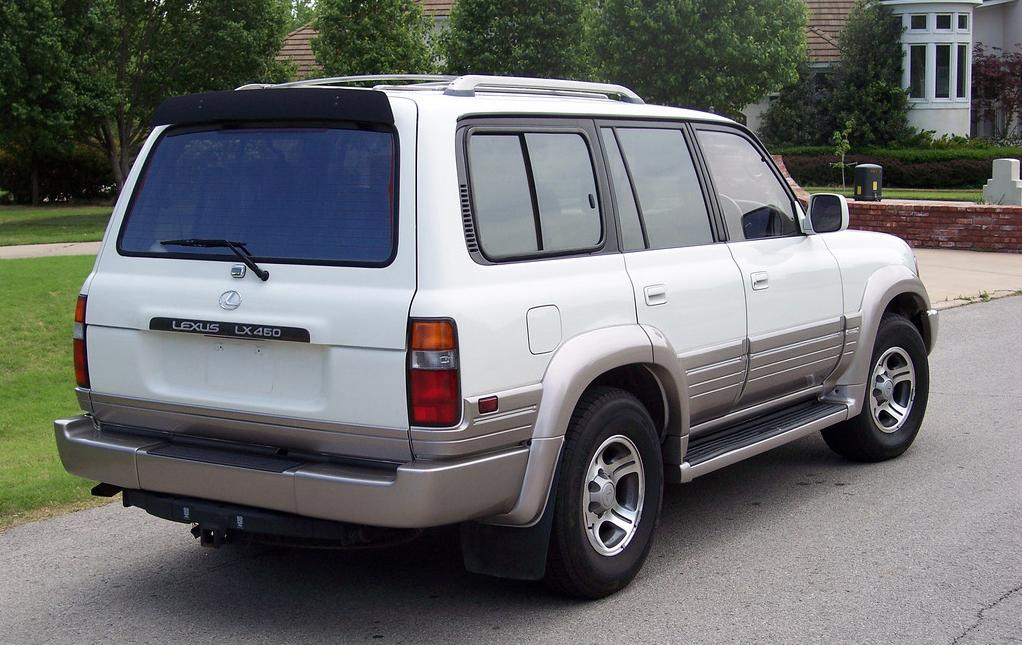 LX450